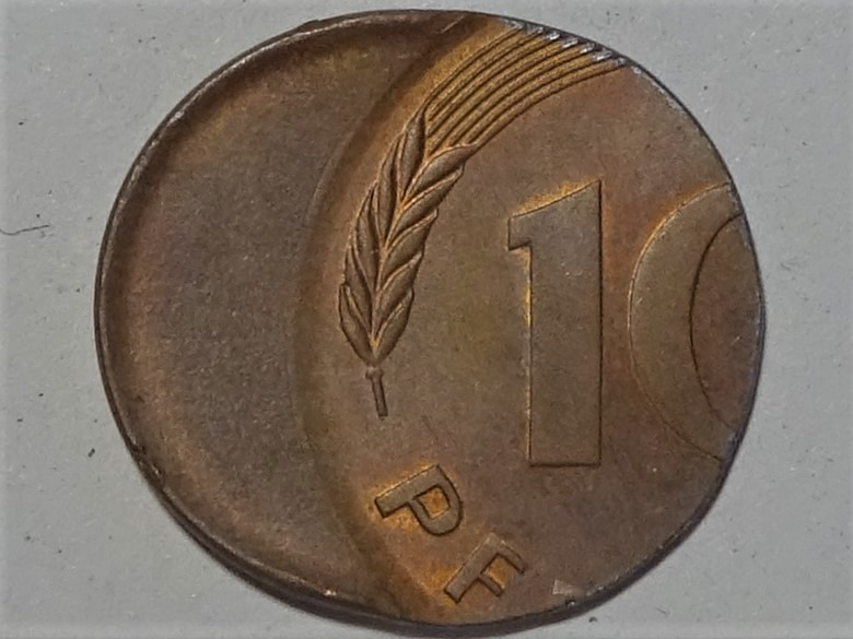 Verprägung 10 Pfennigstempel (dezentriert) auf Rohling für 2 Pfennige